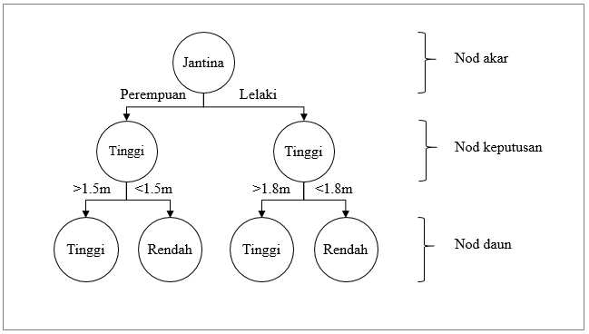 Gambaran Teknik Pohon Keputusan